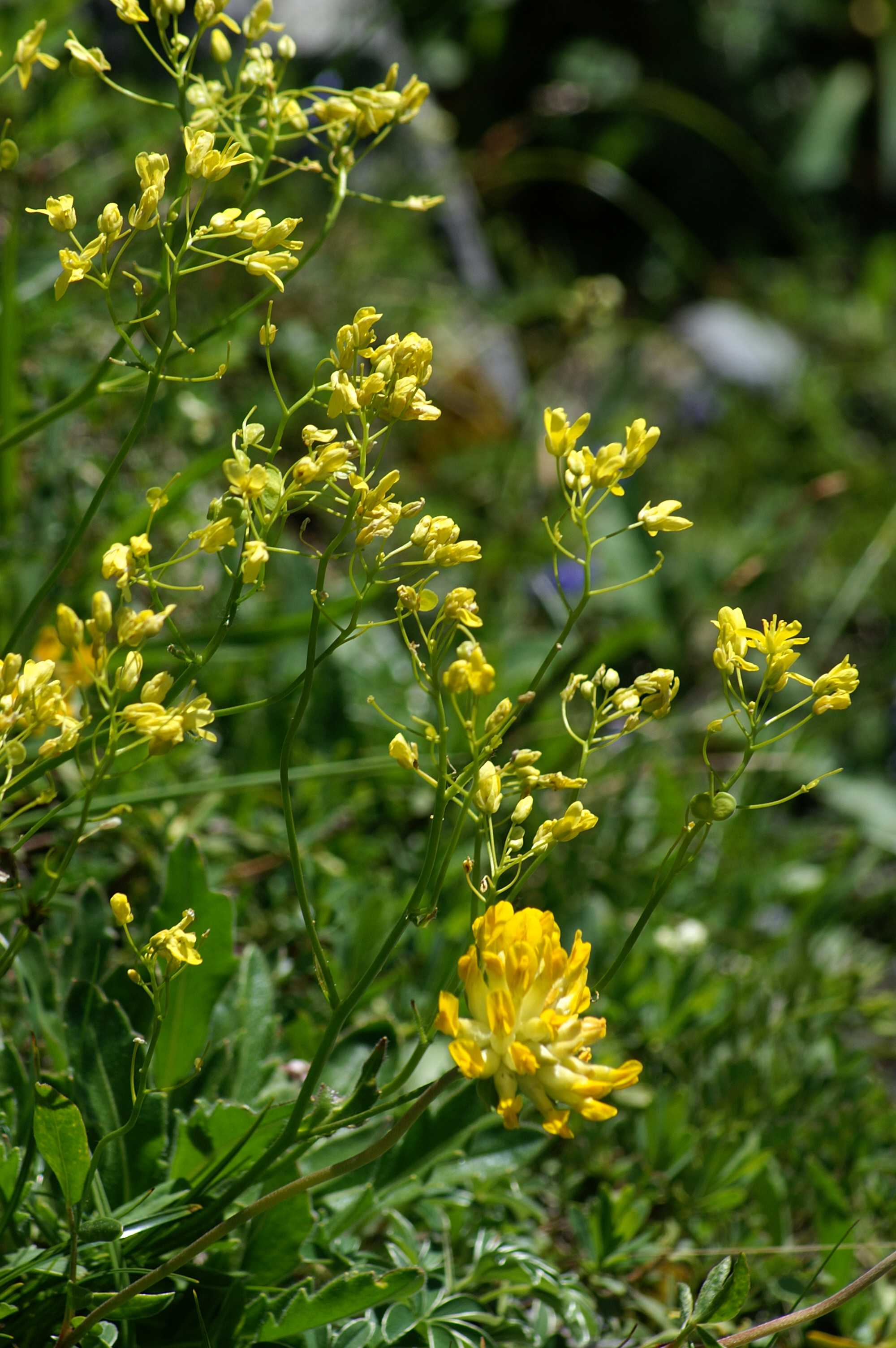 Das Glatt-Brillenschötchen (Biscutella laevigata), auch Glattfrüchtiges Brillenschötchen genannt, ist eine Art aus der Gattung Brillenschötchen (Biscutella) und gehört zu den Kreuzblütengewächsen (Brassicaceae).